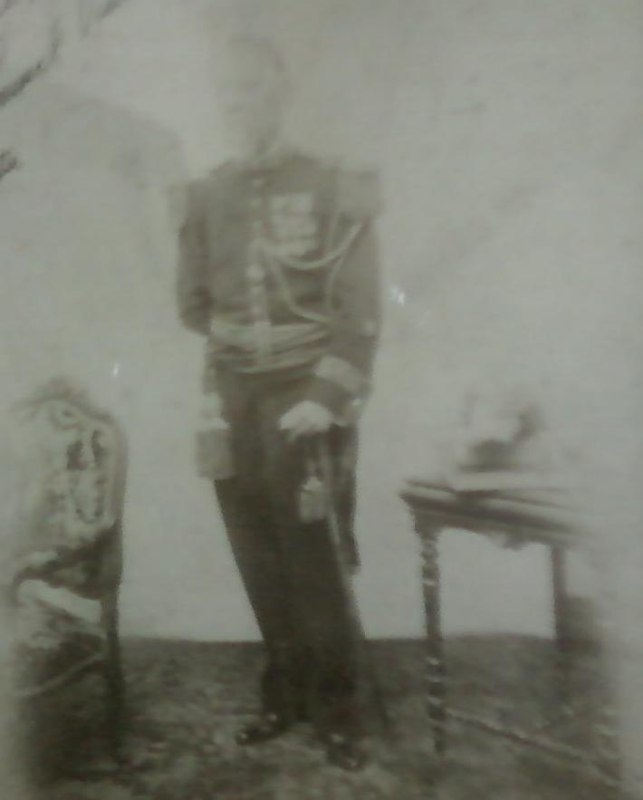 Imagen del gobernador tomada en 1900.